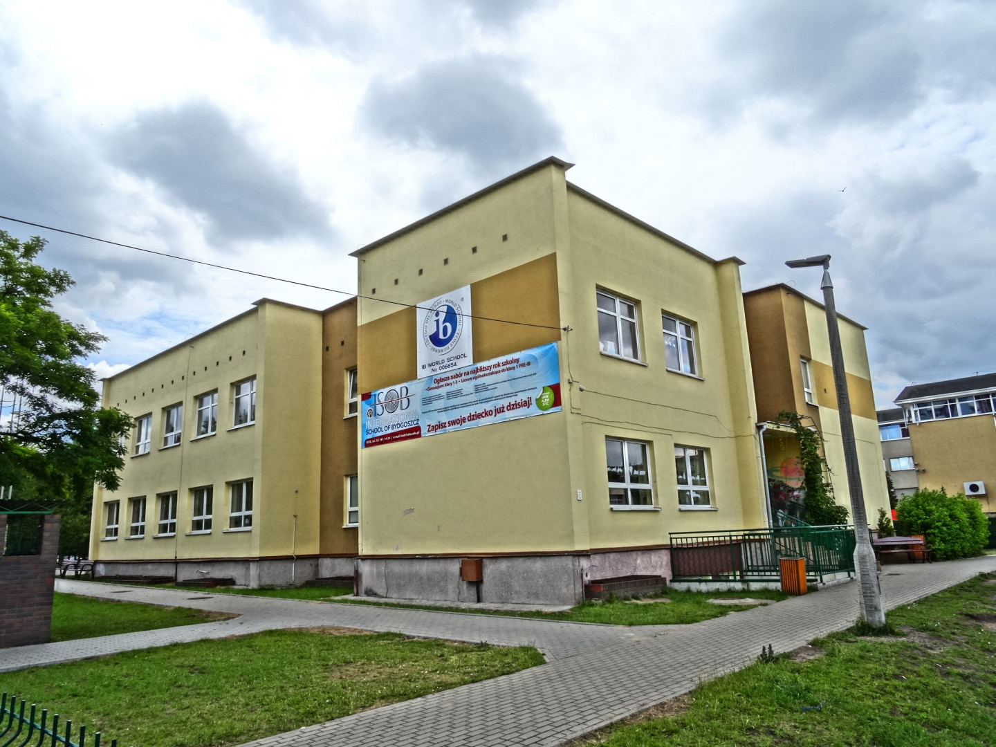 International School of Bydgoszcz (szkoła podstawowa, gimnazjum, liceum ogólnokształcące), ul. Gałczyńskiego 23